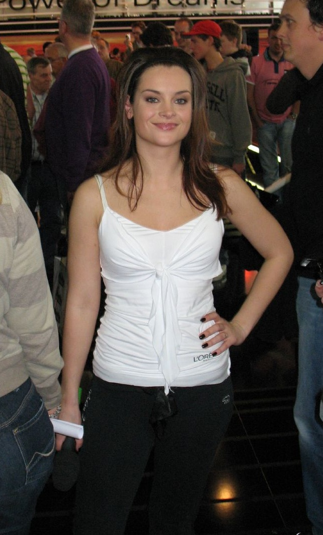 Miljuschka Witzenhausen at Auto RAI 2007, Amsterdam